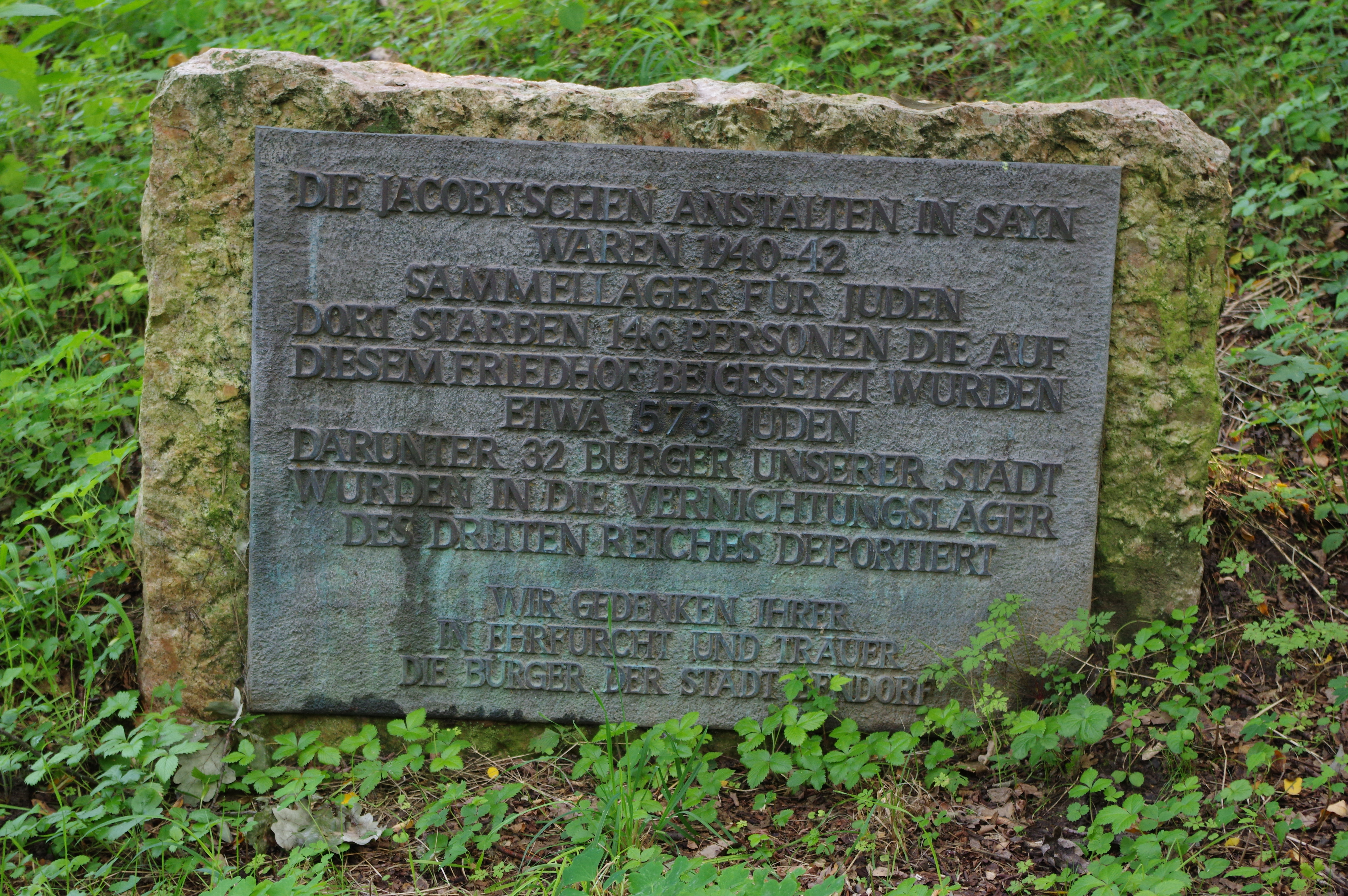 Jüdischer Friedhof Sayn, Gedenkstein von 1988